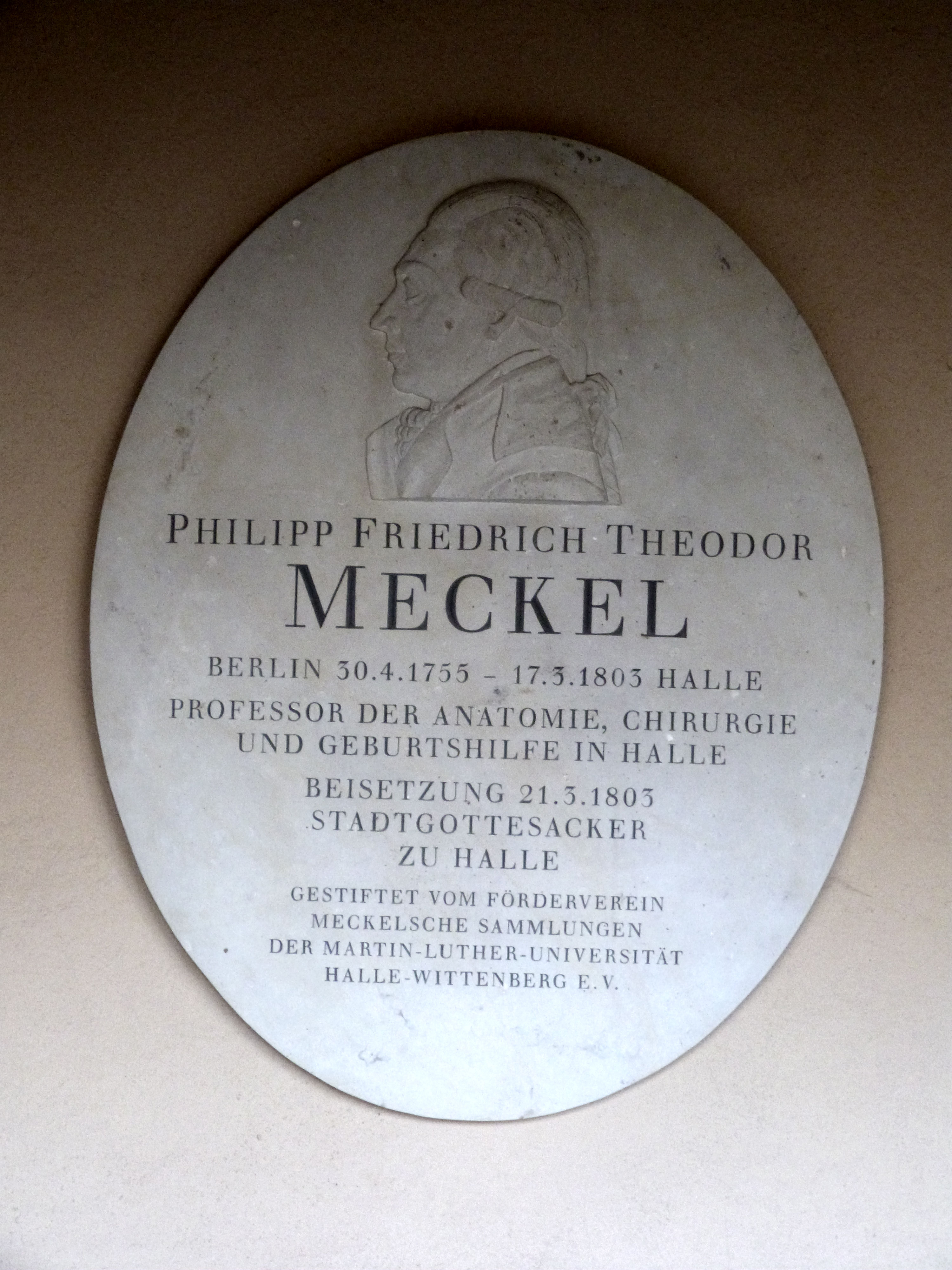 Grabtafel für Philipp Friedrich Theodor Meckel, Grabbogen 76, Stadtgottesacker, Halle (Saale)